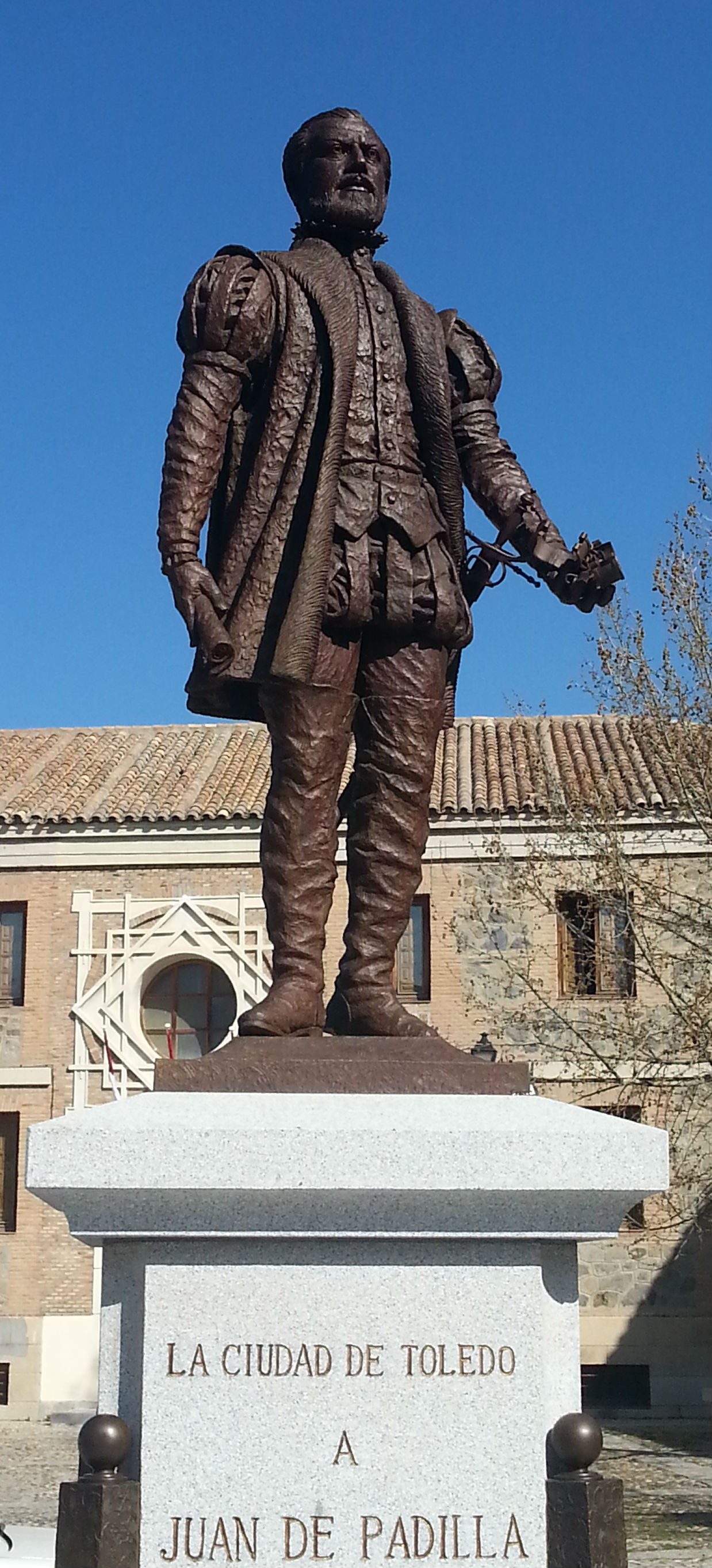 Escultura en bronce de Juan de Padilla, obra del escultor toledano Julio Martín de Vidales, donada por la Fundación Soliss. Fue colocada el 15 de marzo de 2015 en la plaza que ocupa el solar donde se levantaba la casa de este héroe comunero castellano.